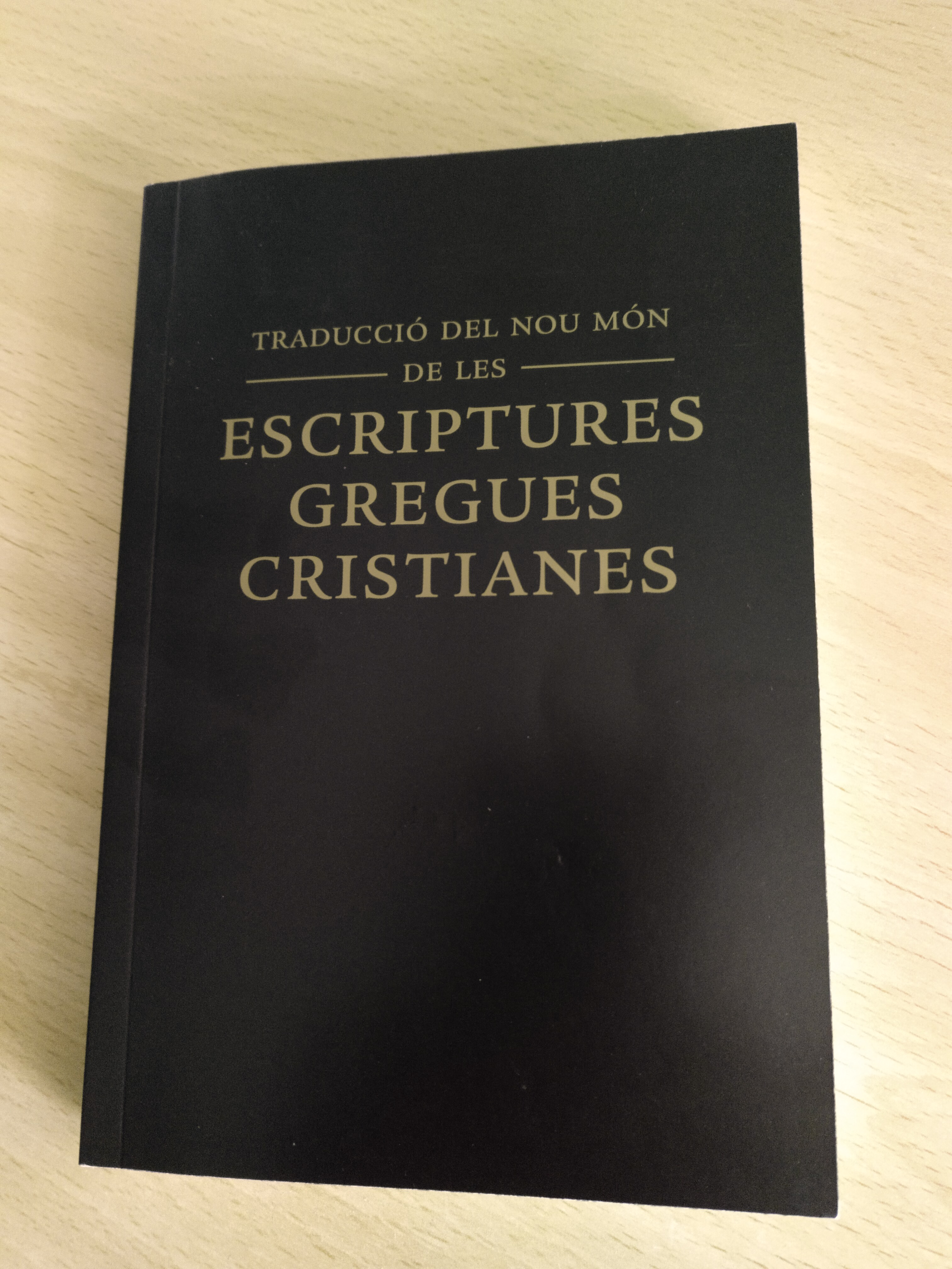 Traducció del Nou Món de les Escriptures Gregues